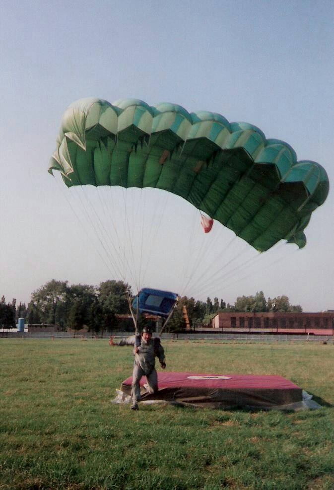 Międzynarodowe Spadochronowe Mistrzostwa Śląska 2000. Waldemar Zygała skok na celność lądowania - Sekcja Spadochronowa Aeroklubu Gliwickiego